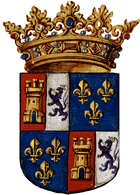 Armas de la Casa de Medinaceli (de la Cerda)